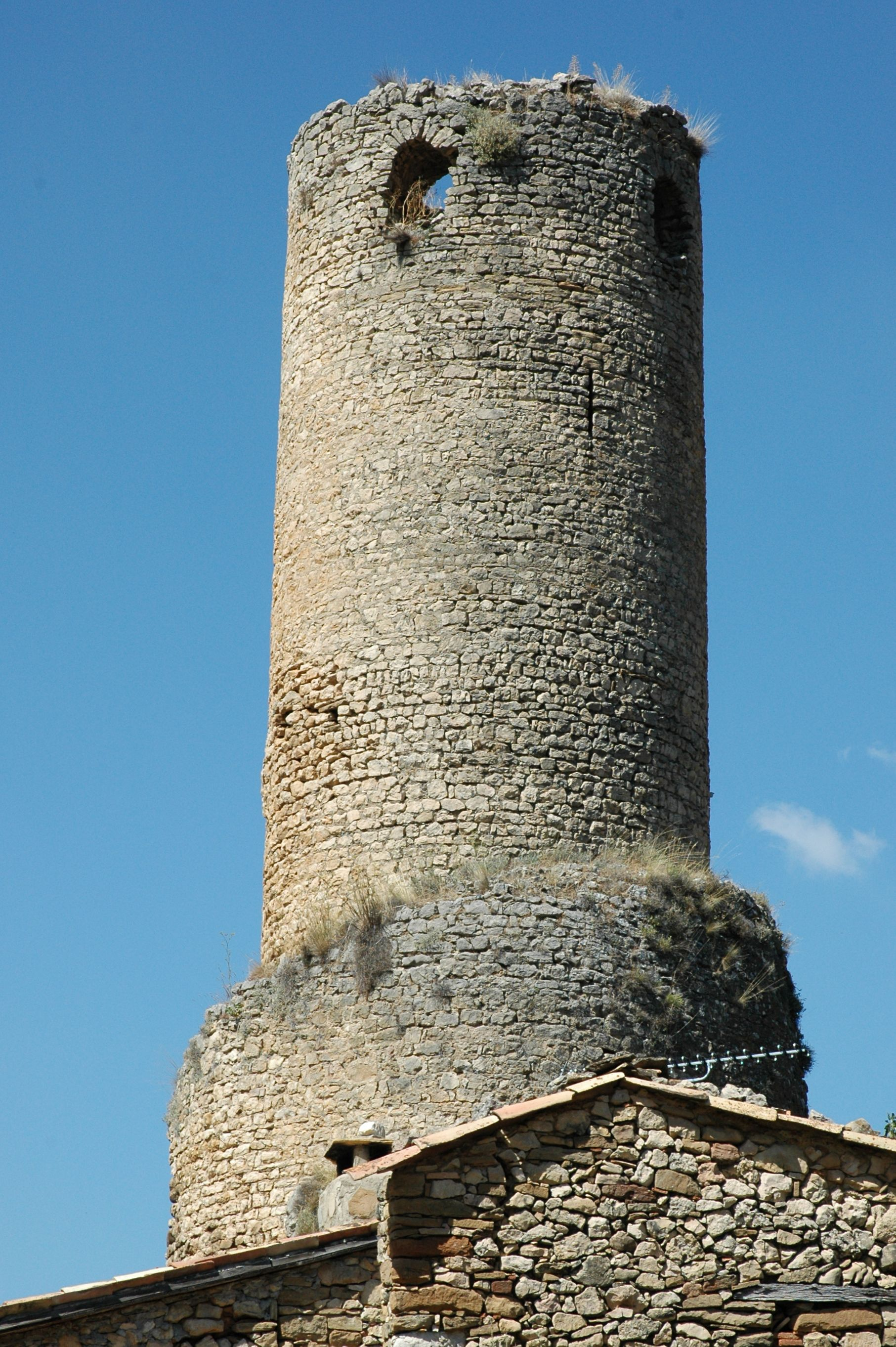 Castell d'Alsamora